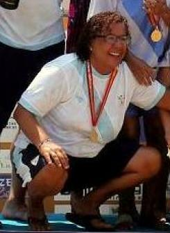 Pilar Neira en 2013.